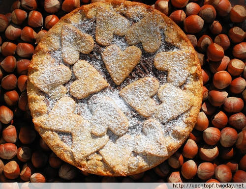 Crostata alla Nutella for World Nutella Day.